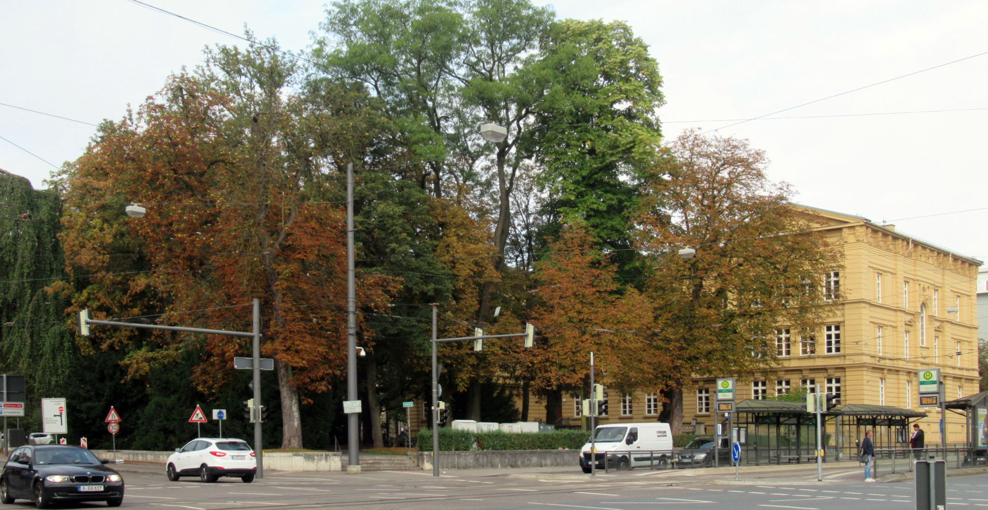 Augsburg-Bahnhofsviertel: Grünanlage Stadtpflegeranger an der Straße Am Alten Einlaß (li.) / Ecke Volkhartstraße (re.); im Hintergrund rechts die „Stadtpflegeranger-Schule“ (St.-Anna-Grundschule); rechts in der Volkhartstraße die AVV-Haltestelle „Staatstheater“